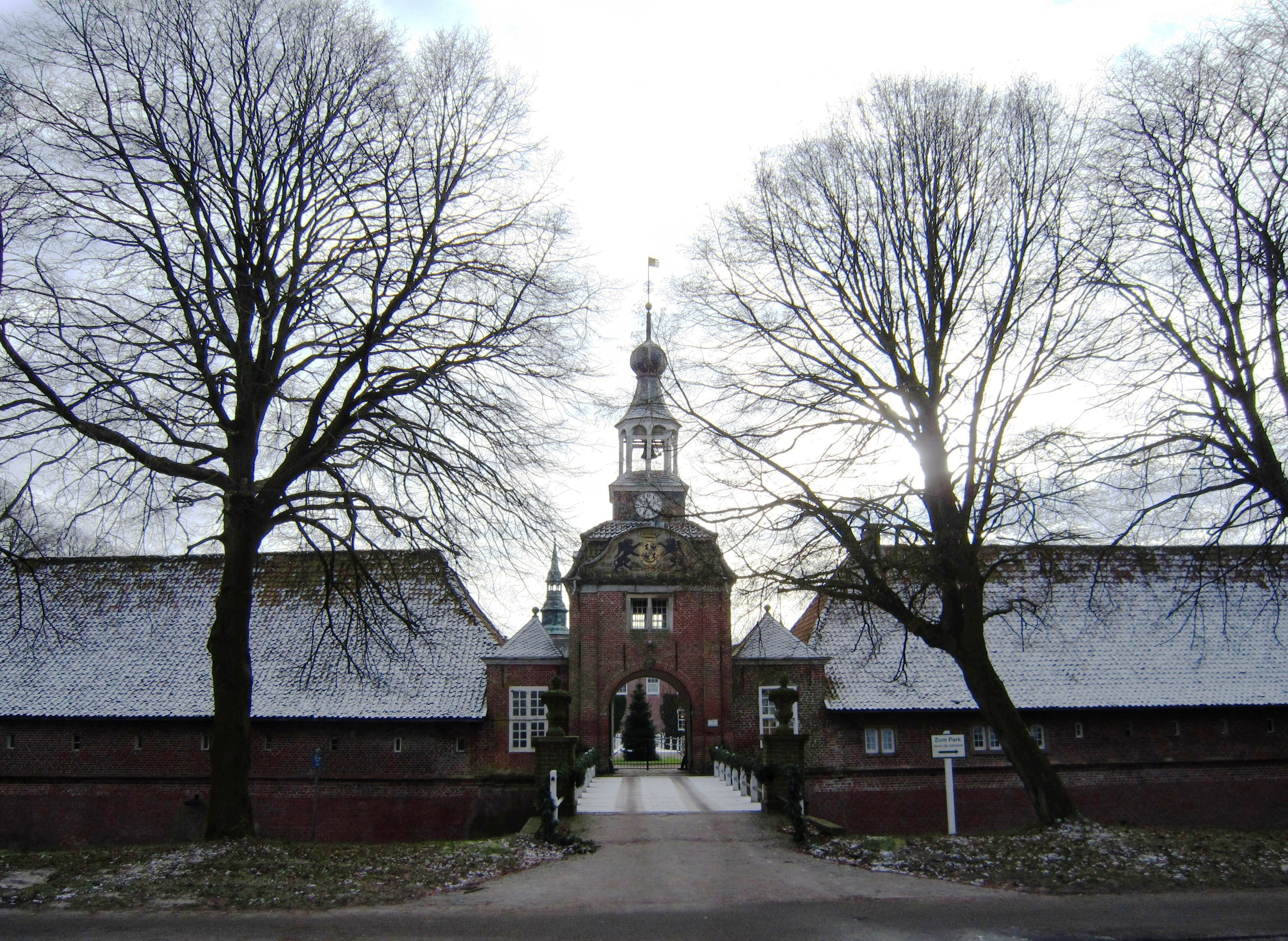 Schloss Lütetsburg